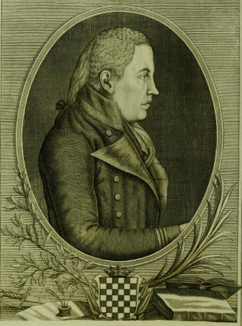 Retrato de don José Alejandro Aycinena y Carrillo en 1812.